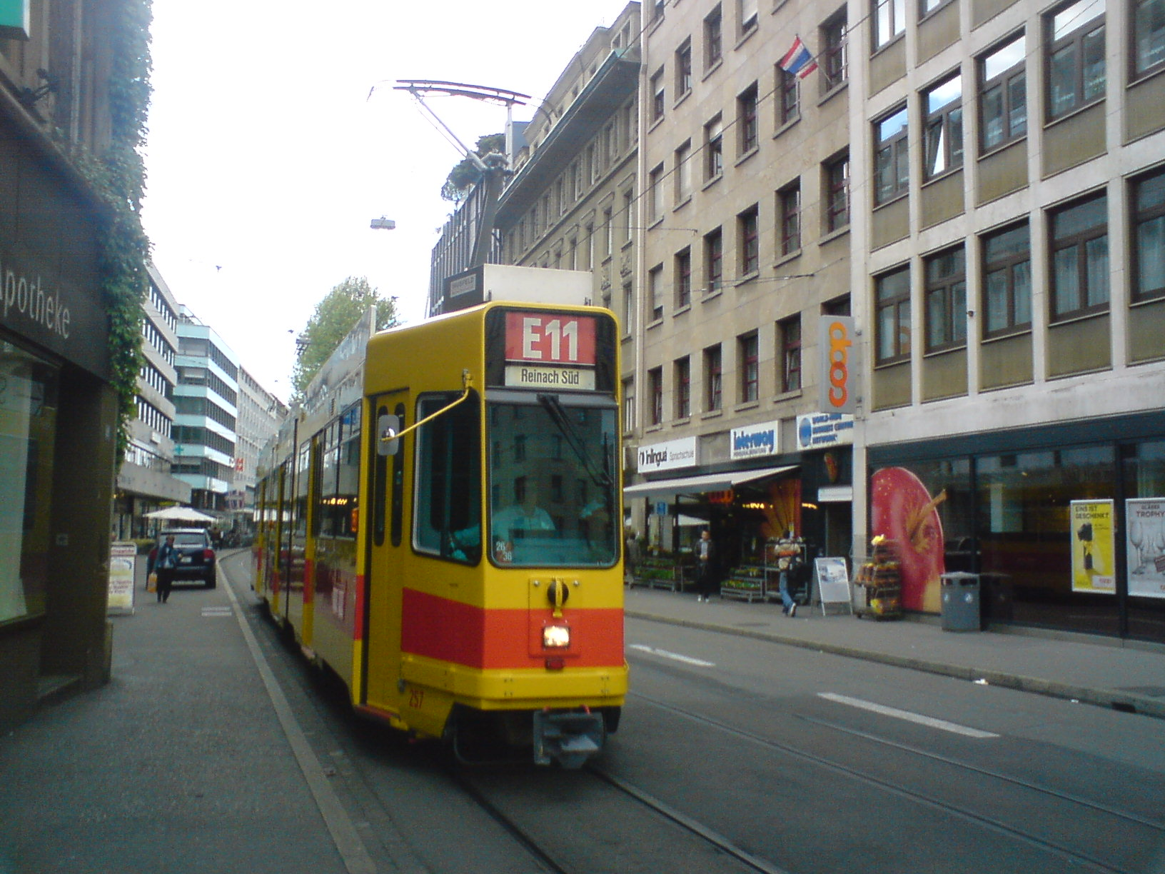 Un tram de la ligne E11 rejoignant "Aeschenplatz"